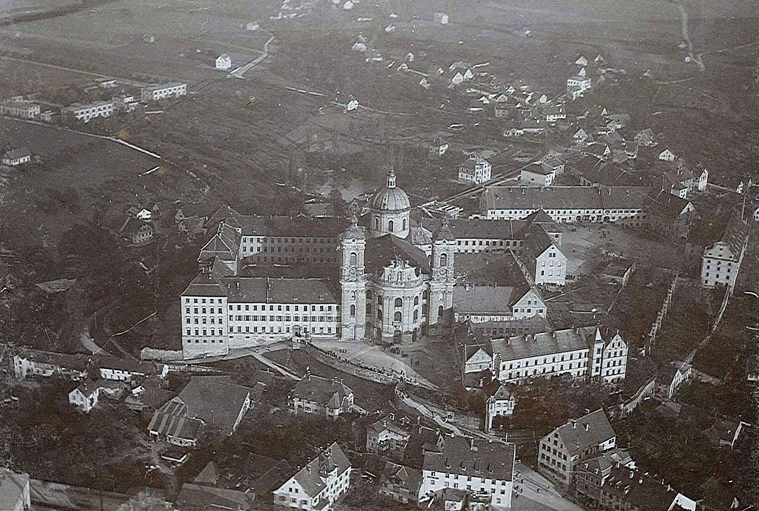 Kloster Weingarten Luftaufnahme 29. Oktober 1908